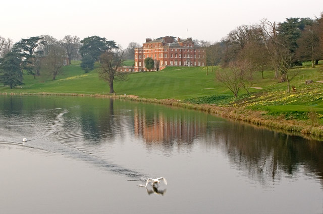 A swan takes off from The Broadwater, an artificial lake on the River Lea, with Brocket Hall behind. Brocket Hall was built by James Paine in 1760, although there had been two previous buildings on the site, the first dating from 1239. It was the home of two Prime Ministers, Lord Melbourne and Lord Palmerston, who died at Brocket in 1865 while in office. It was later the home of the Baronets Brocket, the third Baronet converting it into a hotel, which is its current use. It is grade I listed - for listing particulars